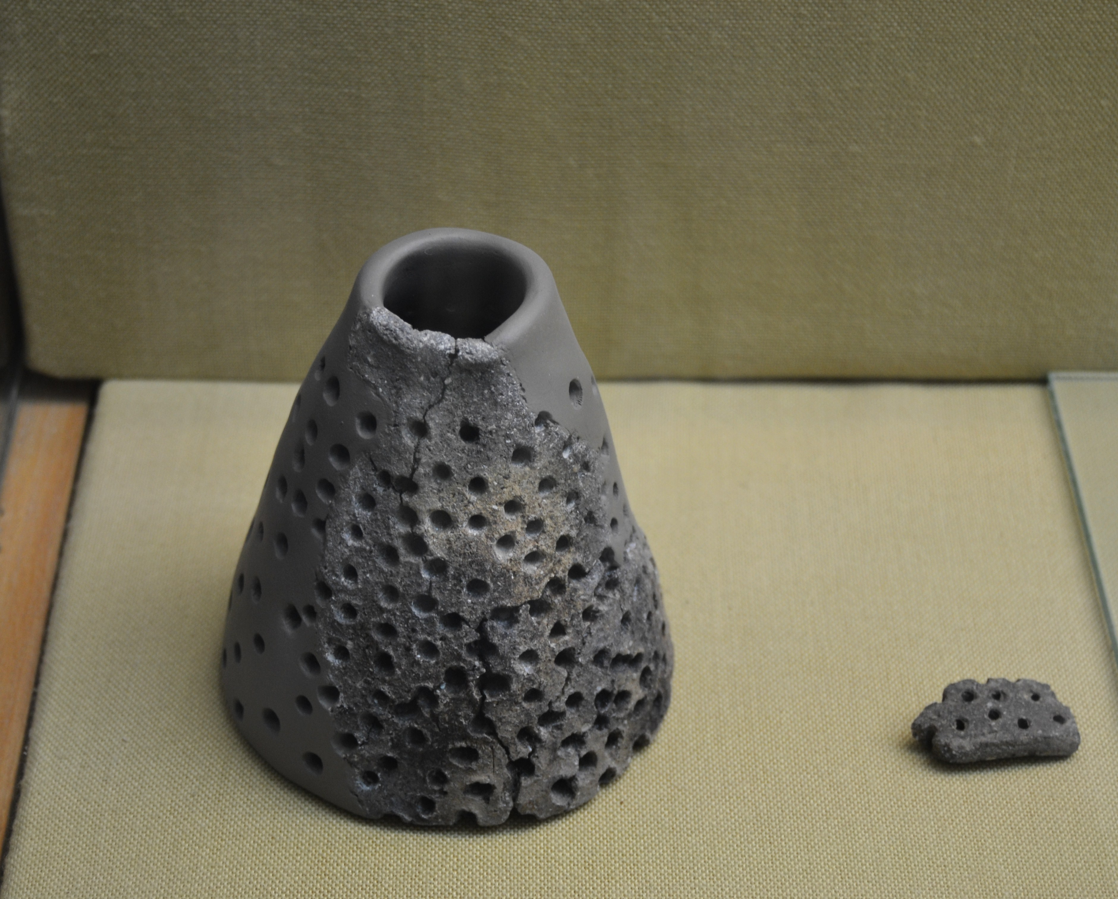 Formatgera de ceràmica feta a mà, edat del Bronze, mitjans del segon mil·leni abans de la nostra era. Procedeix de la Cova del Montgó, Museu Soler Blasco de Xàbia.